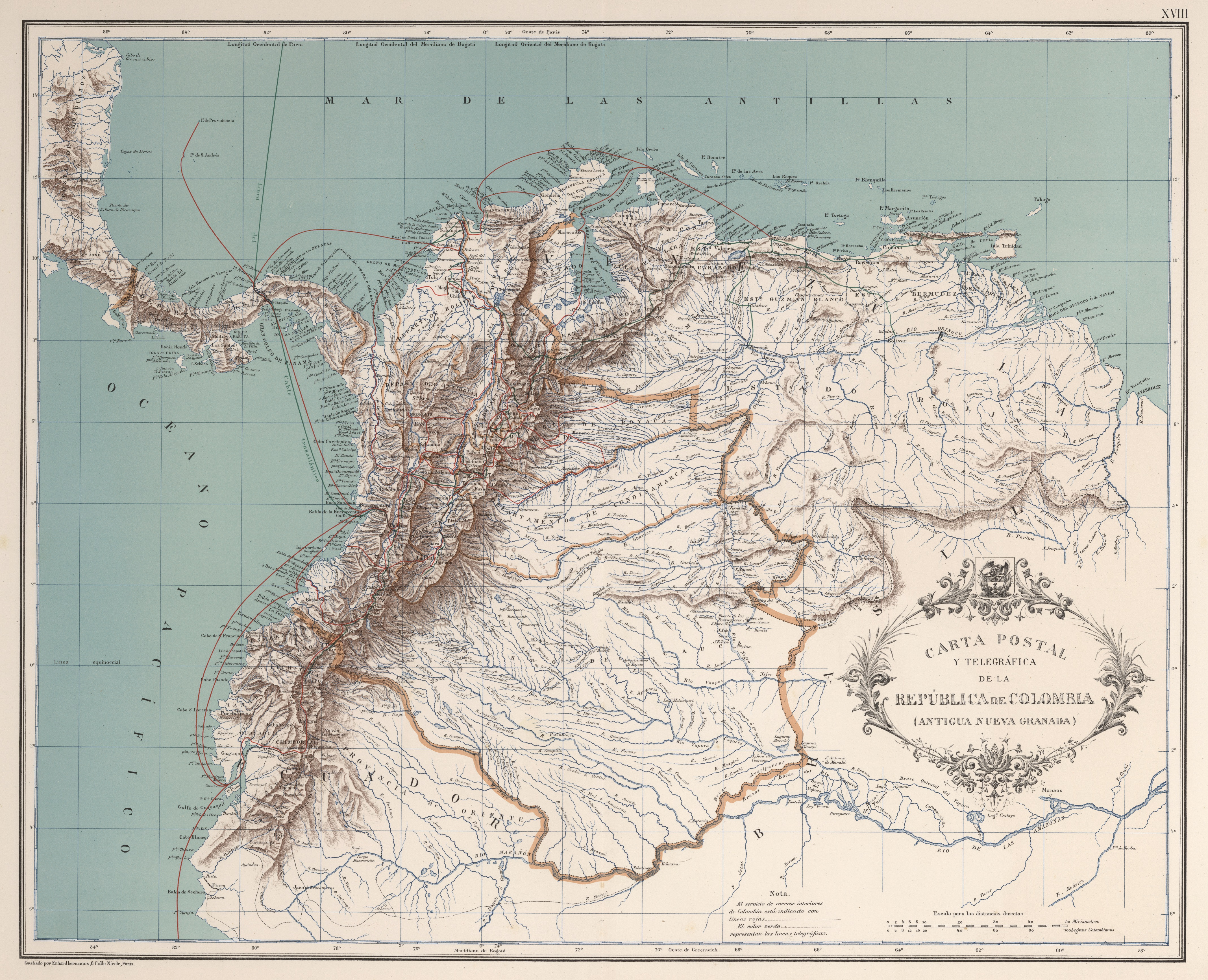 Carta postal y telegráfica de Colombia (Antigua Nueva Granada). Carta XVIII del Atlas geográfico e histórico de la República de Colombia, 1890.